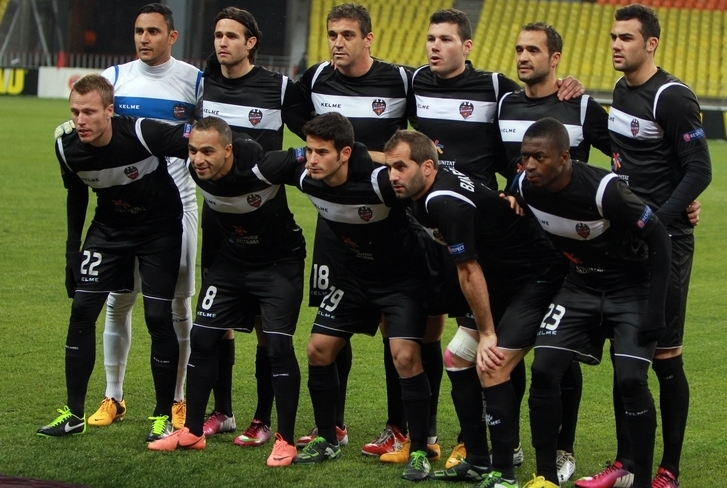 Фк Леванте